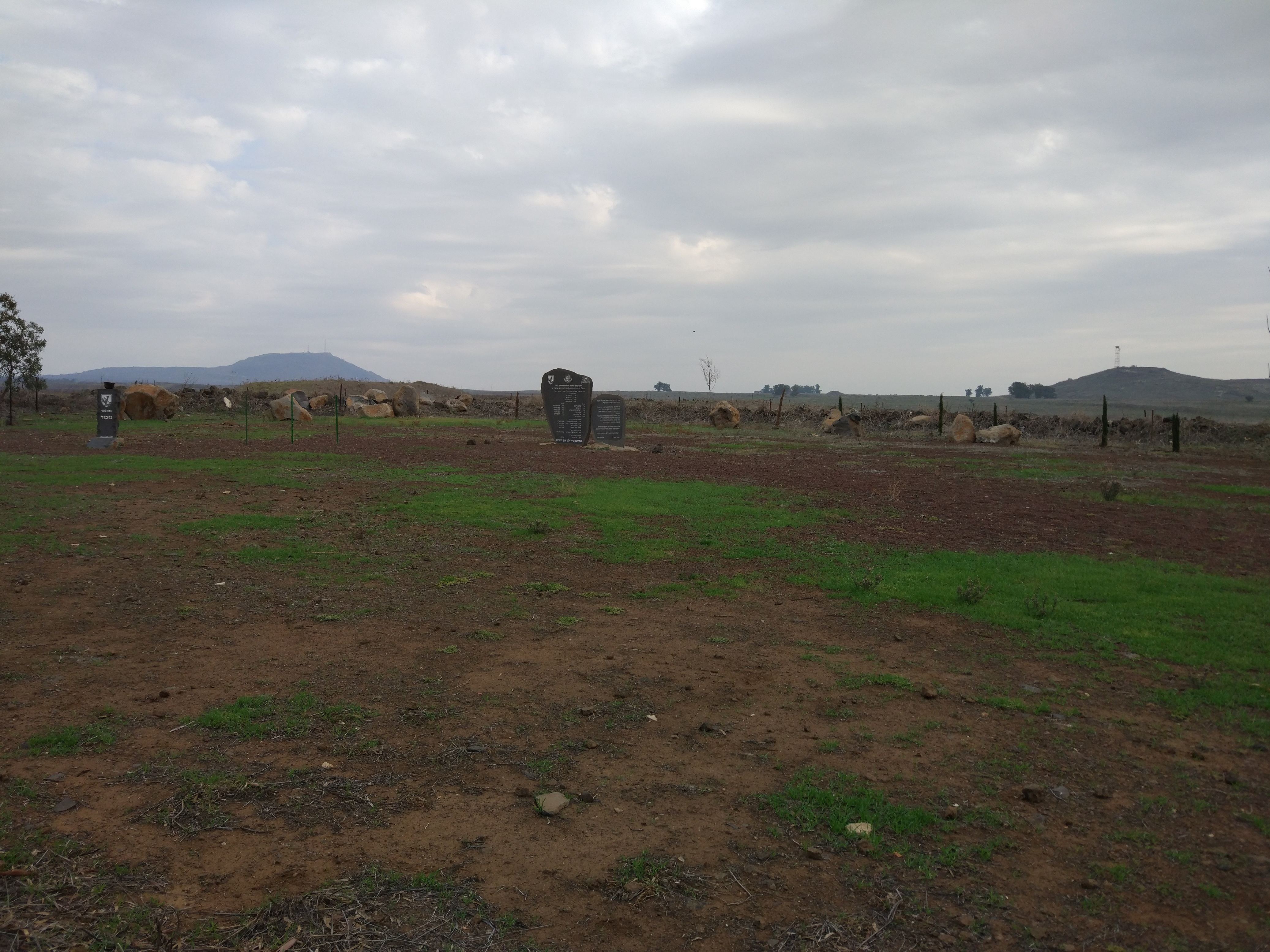 מראה כללי של אנדרטת גדוד 405 בדרום רמת הגולן. מימין גבעת אורחה. ברקע משמאל הר פרס.